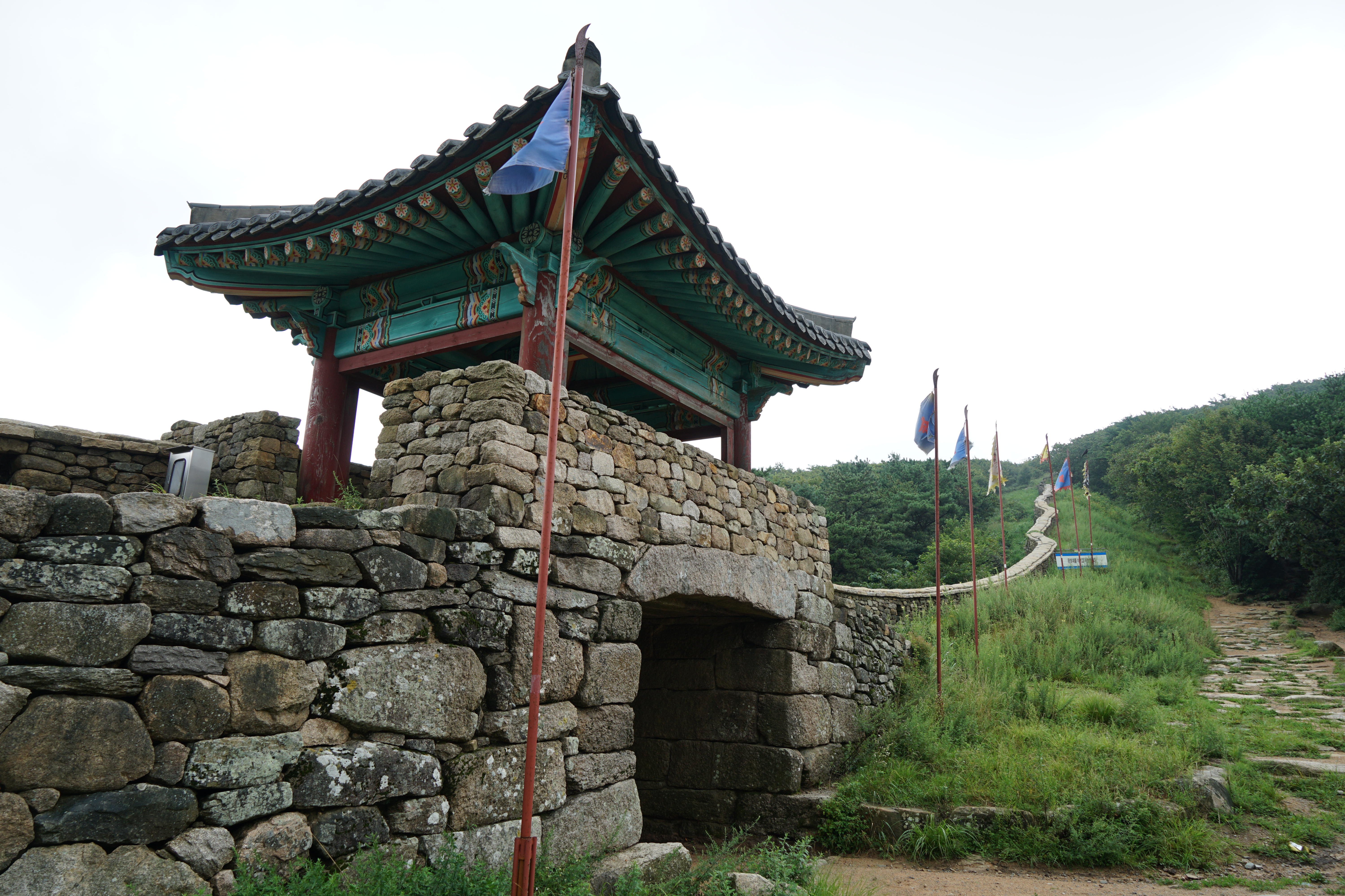 金井山城北門